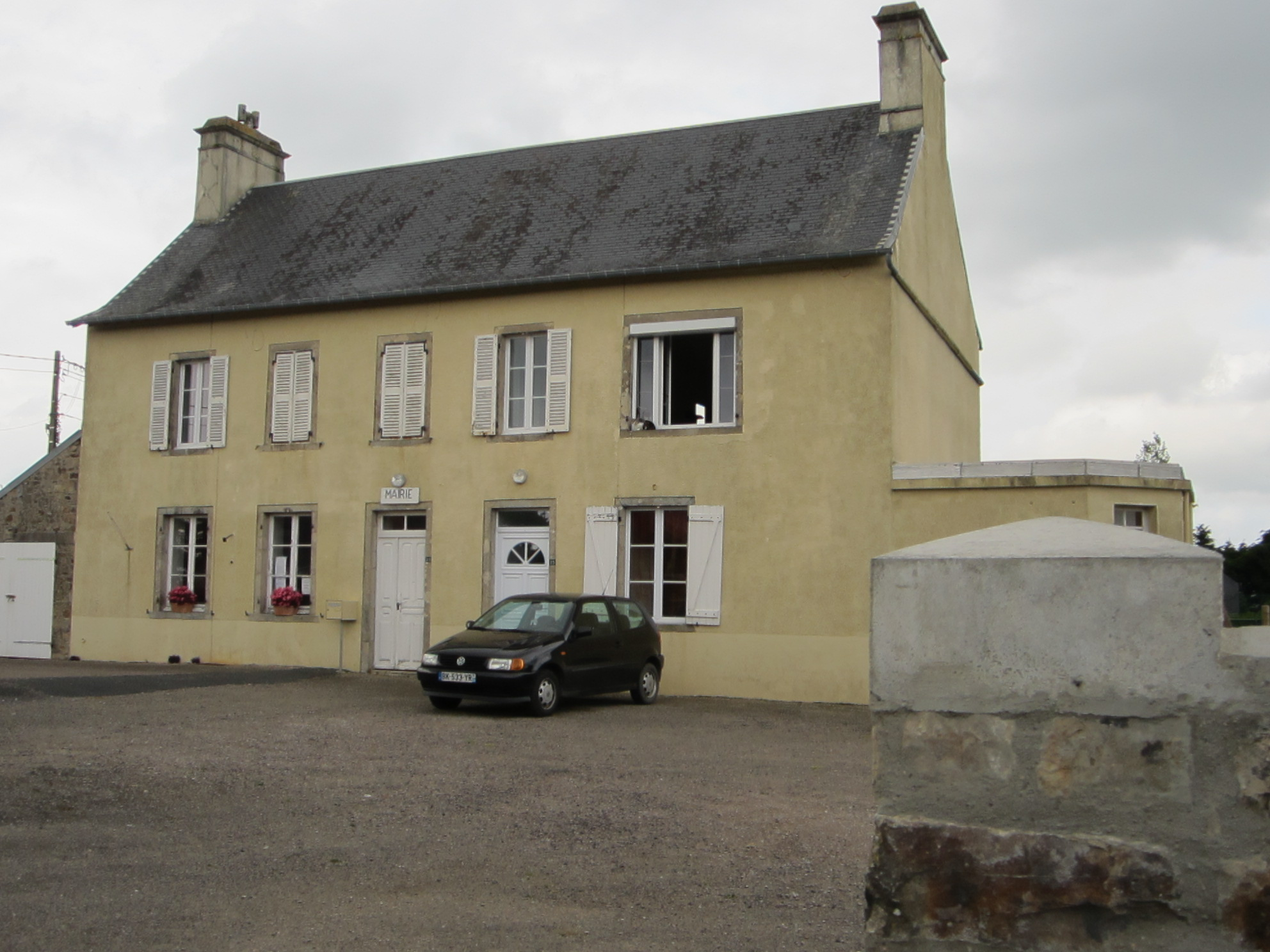 église Saint-Pierre de fr:-Pierre-d'Arthéglise